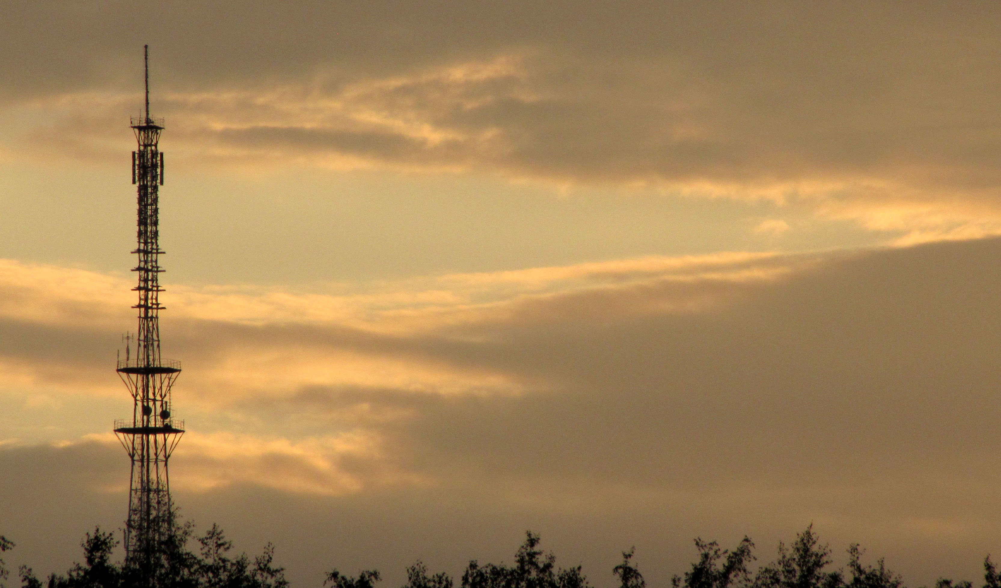 Телебашня в г.Белебей